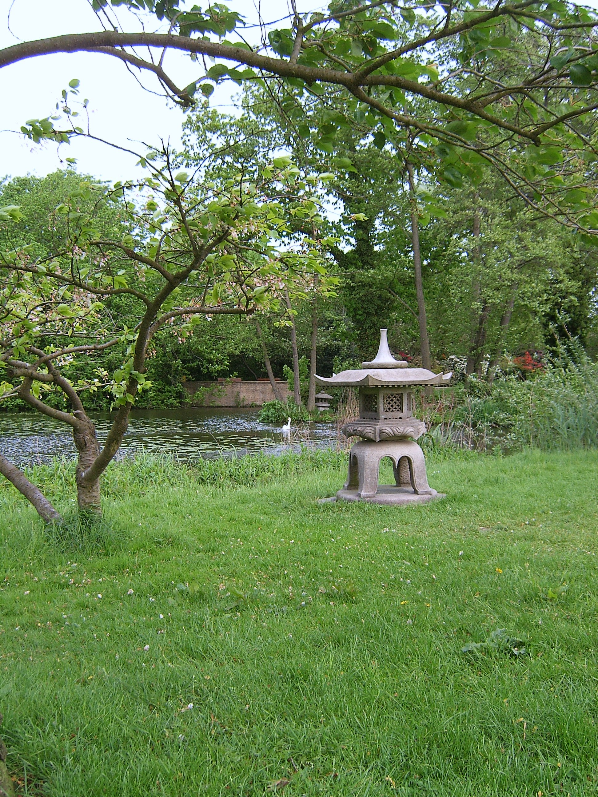 Das Alstervorland in Rotherbaum mit einer japanischen Statuette.